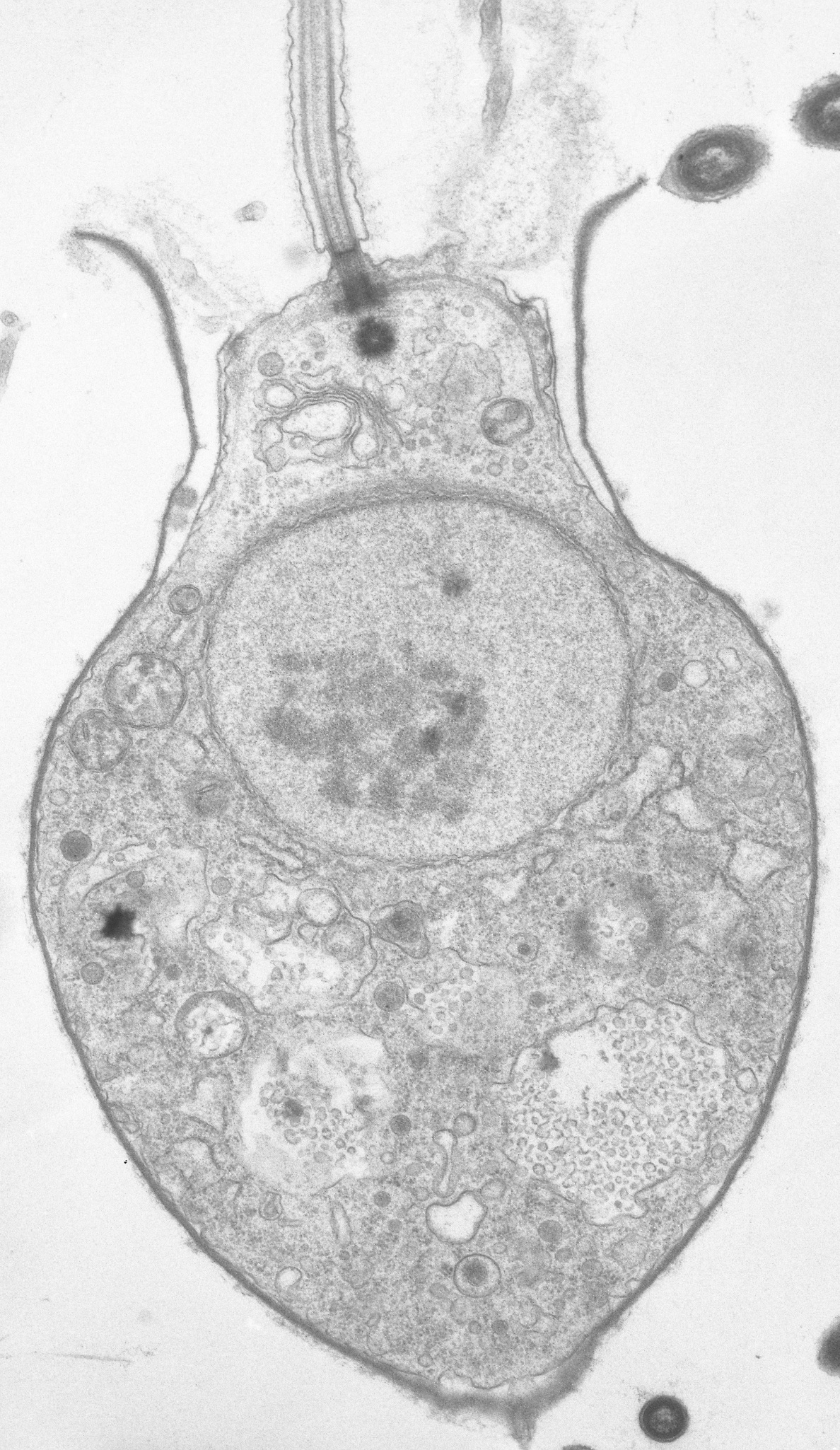 Salpingoeca sp.